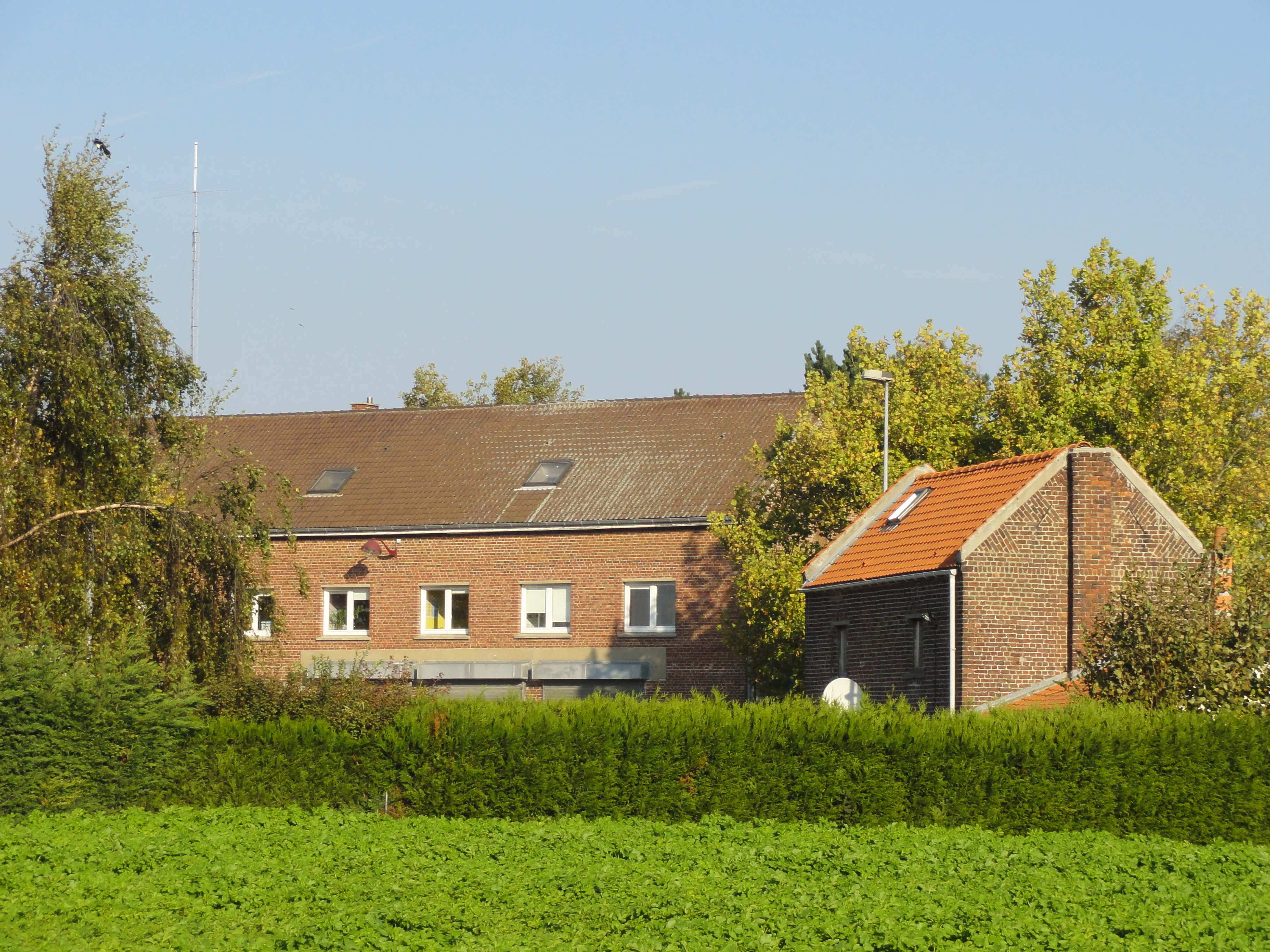 Cités de la Fosse n° 2 de la Compagnie des mines de Carvin, Carvin, Pas-de-Calais, Nord-Pas-de-Calais, France.